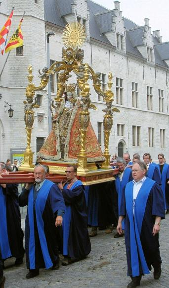 Hanswijkprocessie (Mechelen, België) - Procession de notre-Dame de Hanswijk (Malines, Belgique) - Our Lady of Hanswijk Procession (Mechelen, Belgium)